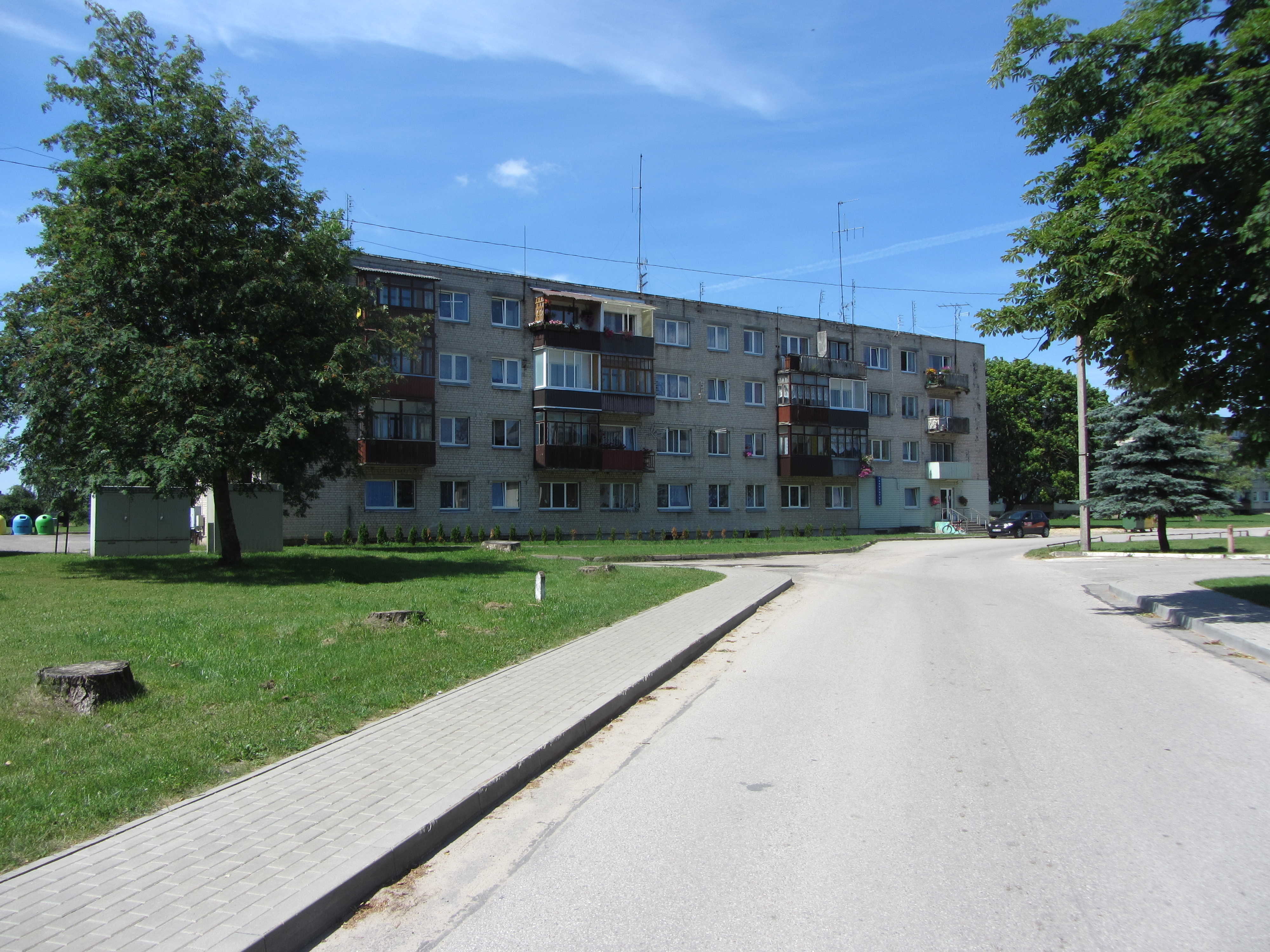 Matuizos, Lithuania